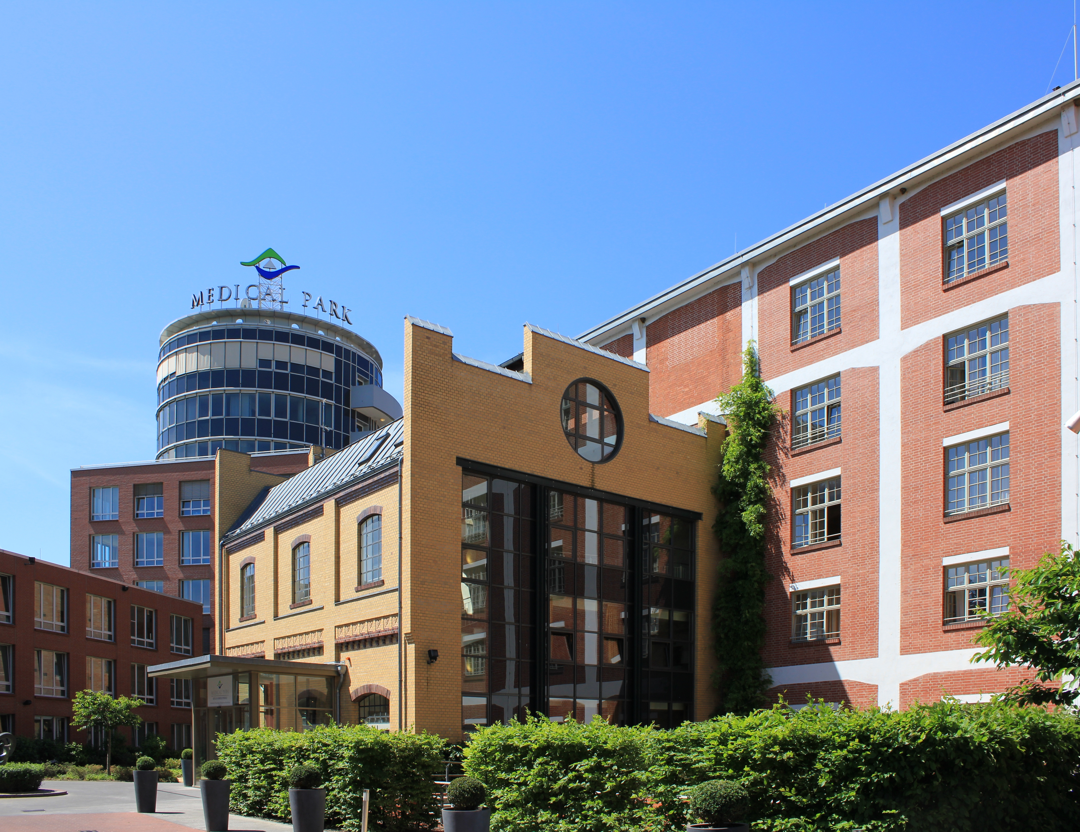 Humboldtmühle in Tegel; im Vordergrund ehemaliges Kesselhaus, im Hintergrund neu gebautes kubusförmiges Bürogebäude mit aufgesetzter Rotunde als "Point de vue" (Um- und Neubau durch Architekten Karl-Heinz D. Steinebach & Friedrich Weber, 1989/92)